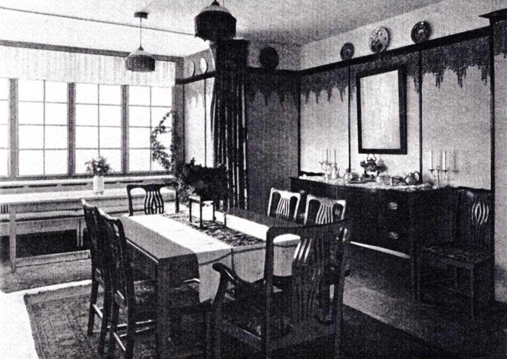 Haus Muthesius Speisezimmer (Original text: Haus Muthesius, Privathaus des Architekten Hermann Muthesius von 1906/09.) Hinweis zur Lizenz: gemeinfrei wegen Ablauf der 70-Jahre Schutzfrist, weil der Künstler und Autor (Hermann Muthesius) 1927 gestorben ist.